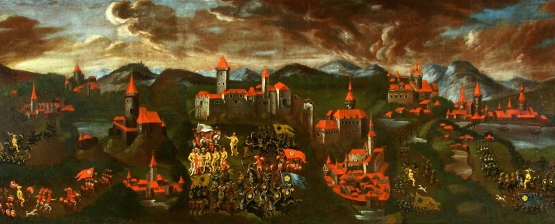 Dělení růží od Antonína Streera 1742